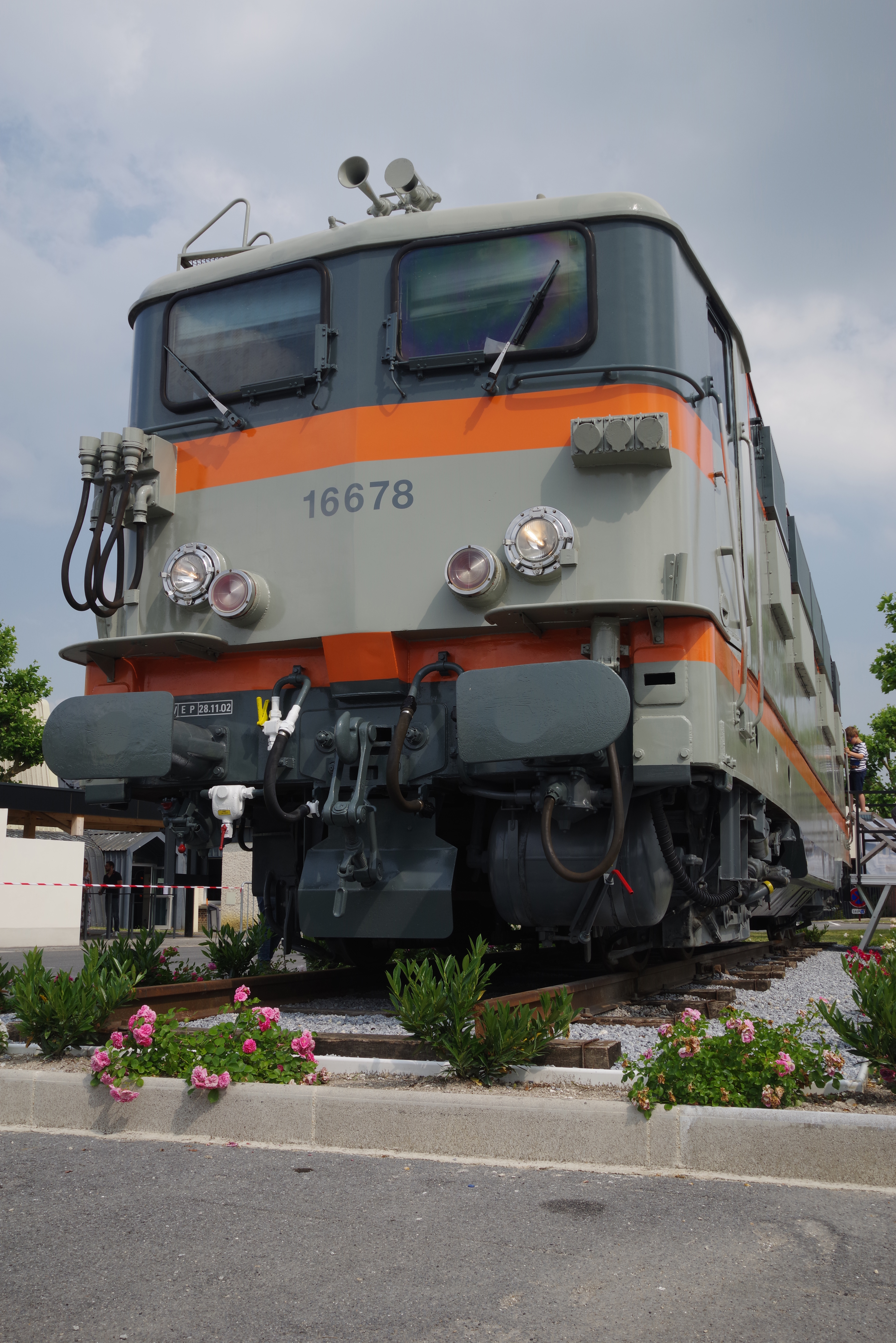 BB 16678 lors de son inauguration officielle le 9 juin 2018, sur une place de la commune de Magenta (Marne), France.